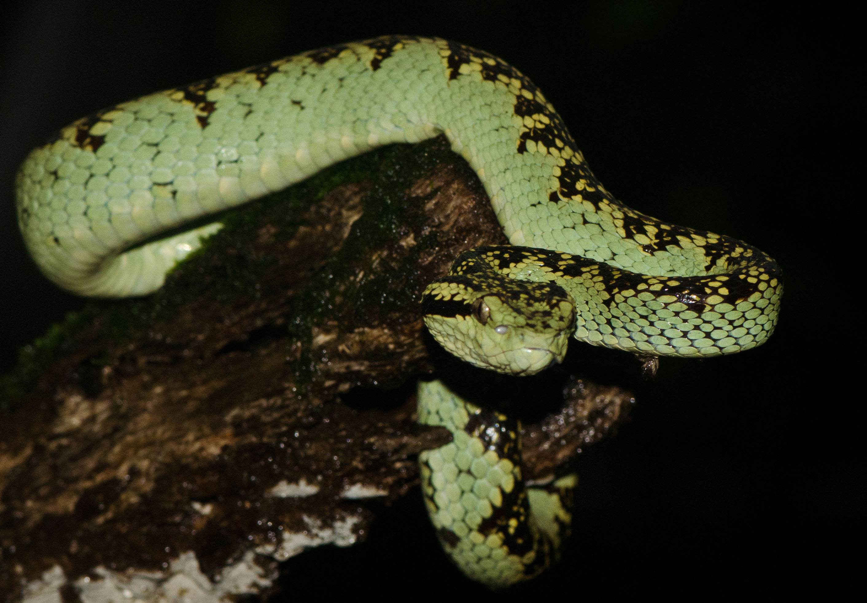 ചോലമണ്ഡലി